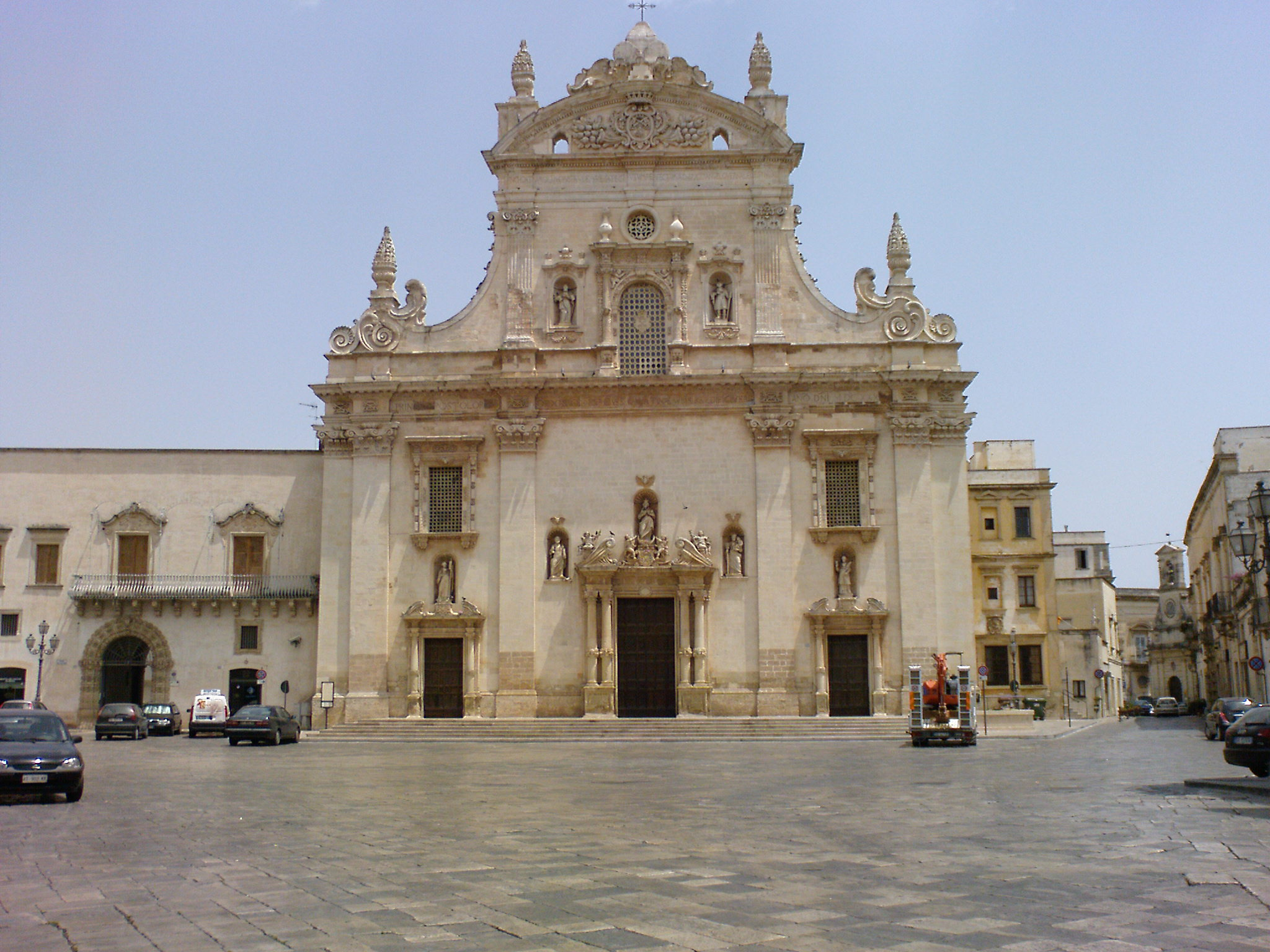 La chiesa Matrice di Galatina, dedicata ai santi Pietro e Paolo. Foto scattata da Matteo Apollonio.